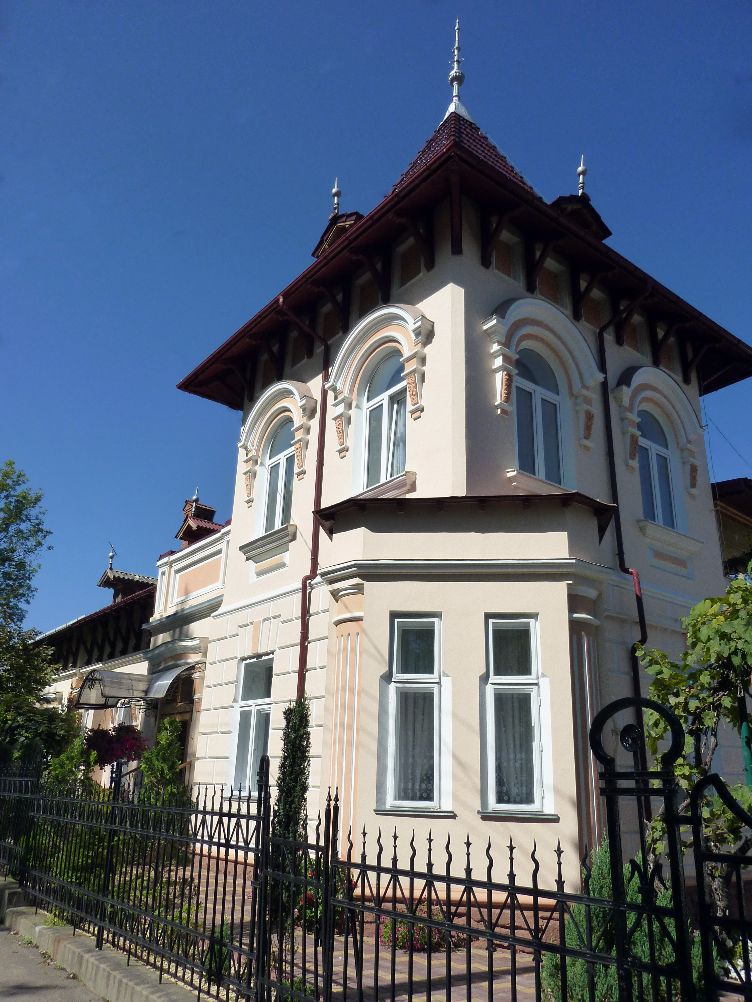 Будинок під №31 належав родині Фельчинських і був збудований на початку ХХ століття.